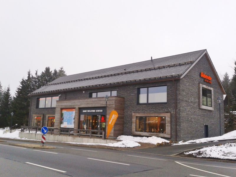 Globetrotter-Outdoorladen und Tourist-Information in Torfhaus im Harz